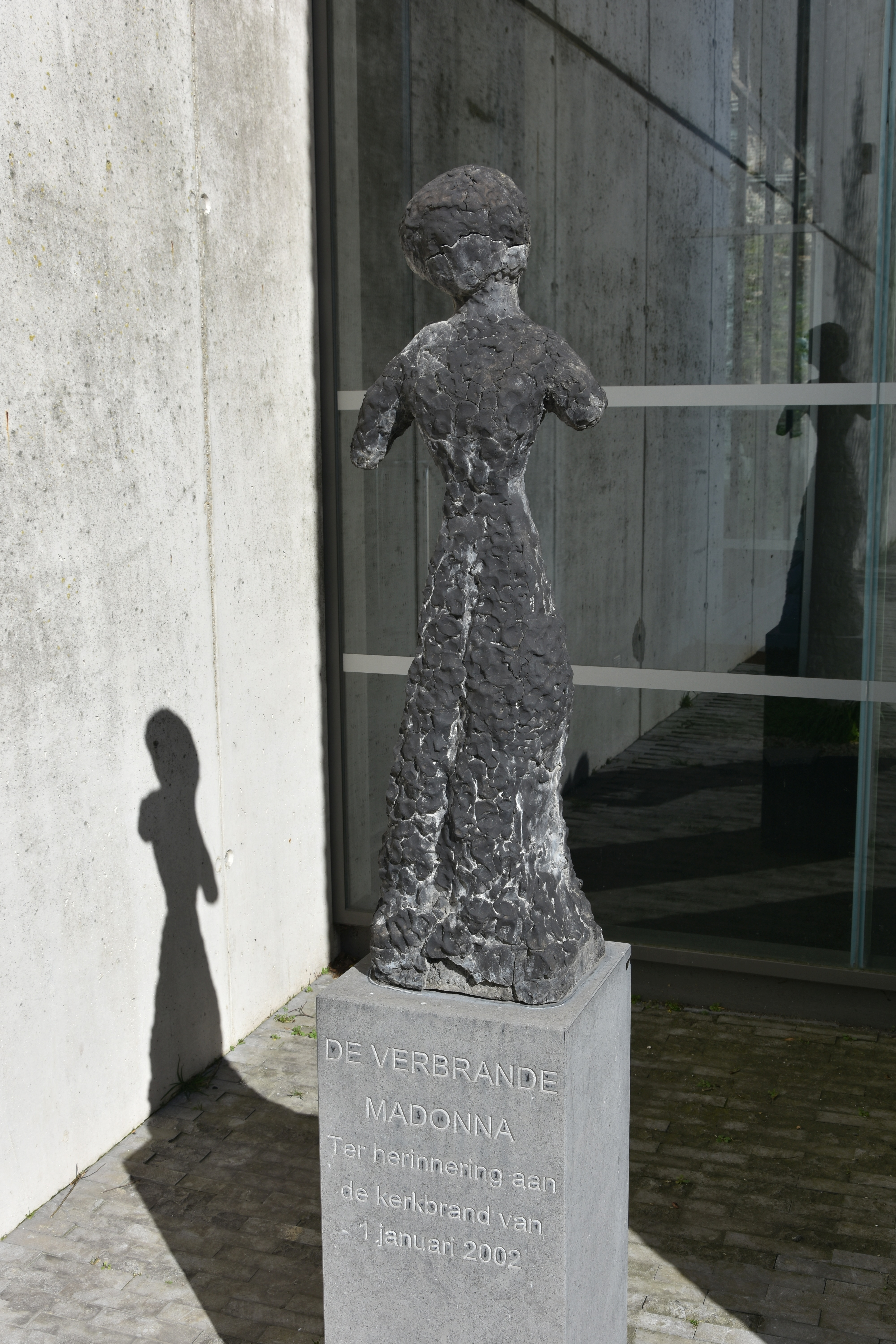 Waarschoot Sint-Ghislenuskerk verbrande madonna 24-03-2019